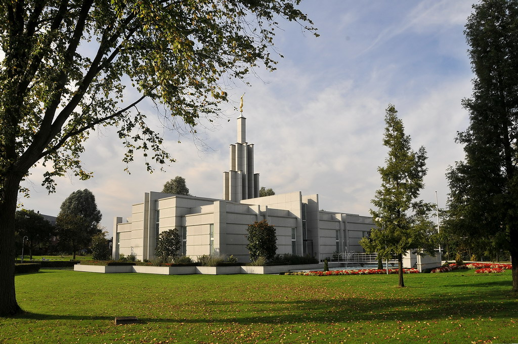 In Zoetermeer werd in 2002 de eerste Mormonentempel van Nederland geopend. De Kerk van Jezus Christus van de Heiligen der Laatste Dagen, zoals de geloofsgroep zich noemt, is een van de snelst groeiende christelijke kerken ter wereld. De gemeenschap werd in 1830 gesticht door de New Yorker Joseph Smith. Tegenwoordig telt de Mormoonse kerk, met de hoofdzetel in Salt Lake City (Utah USA), ruim 14 miljoen volgelingen verspreid over de hele wereld.